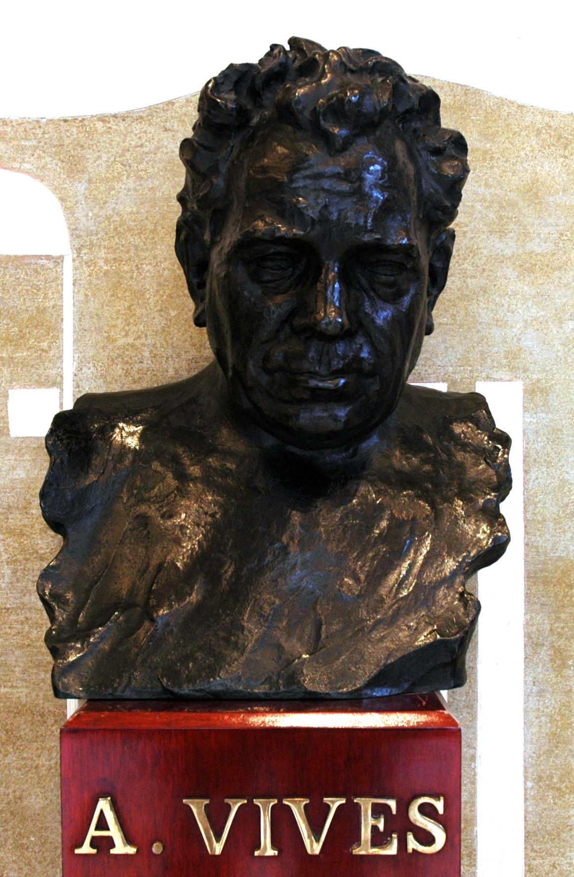 Bust d'Amadeu Vives al Palau de la Música de Barcelona